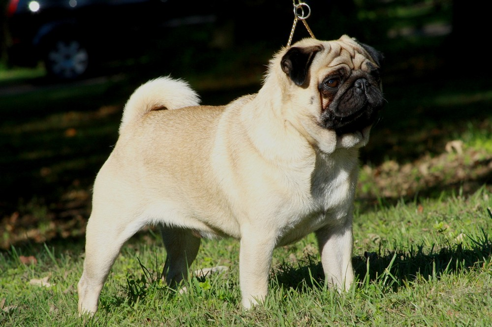 Mops Duke Eastonite Mägdebrunnen aus der englischen Mopszucht Eastonite. Deutscher Jugend-Champion VDH, Deutscher Jugend-Champion DMC. Duke ist bisher (Stand 2011) der einzige Mops aus der englischen Mopszucht Eastonite, der nach Deutschland verkauft wurde. Er ist in Besitz des Zwingers „vom Mägdebrunnen“.